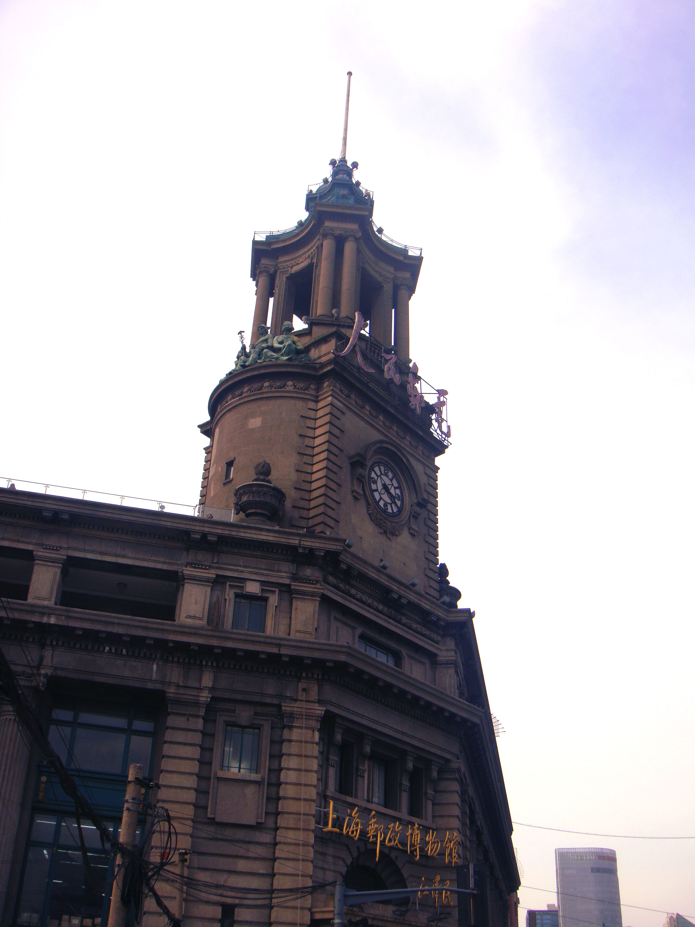 邮政总局大楼正面